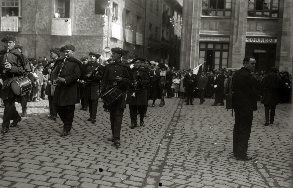 Título original: Banda municipal de txistularis que precede a un desfile de autoridades, por la plaza San Martín de la localidad de Bergara (1/1) Localización: Vergara (Guipúzcoa)